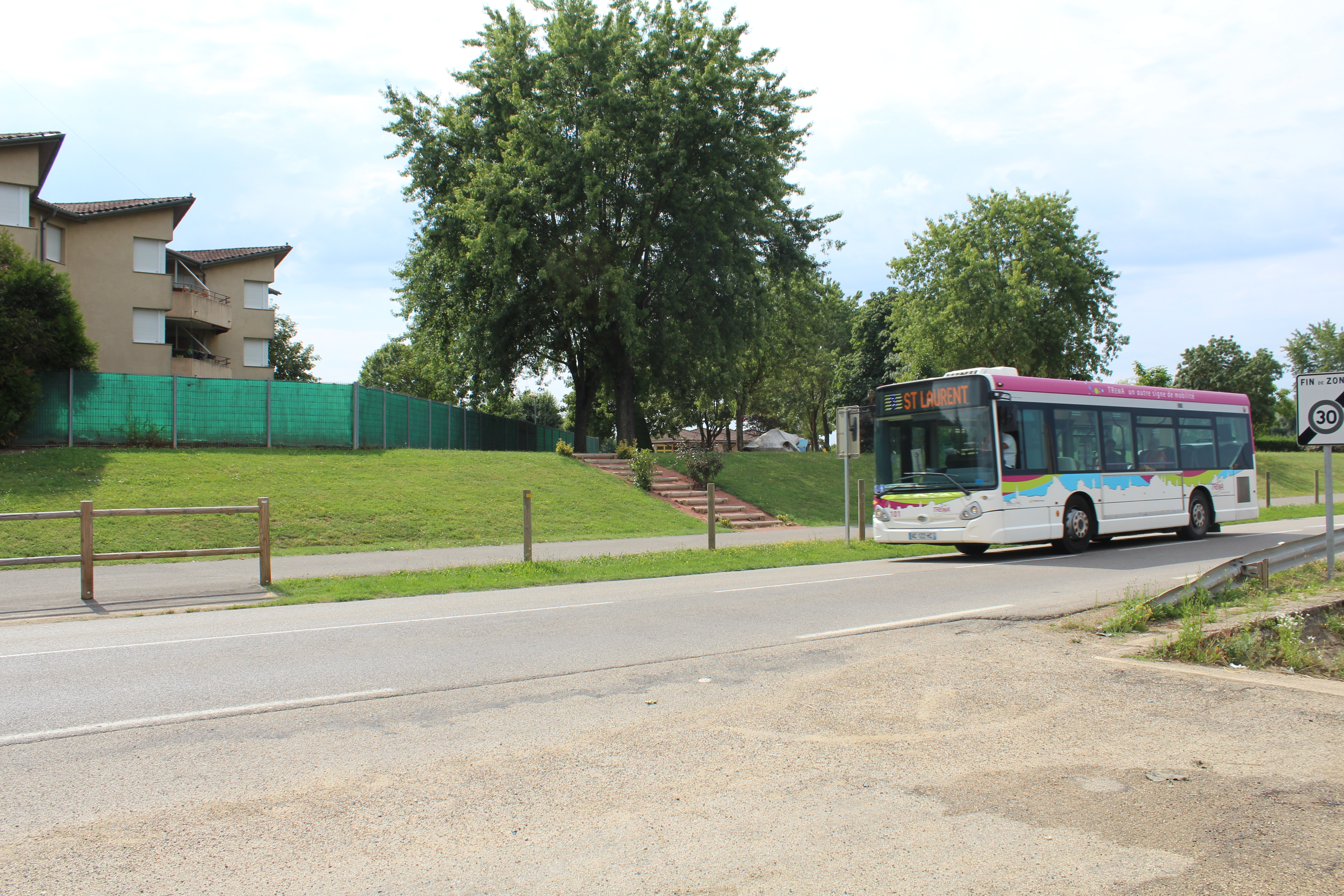 Route D51 et voie cyclable à Saint-Laurent-sur-Saône avec un bus Tréma.